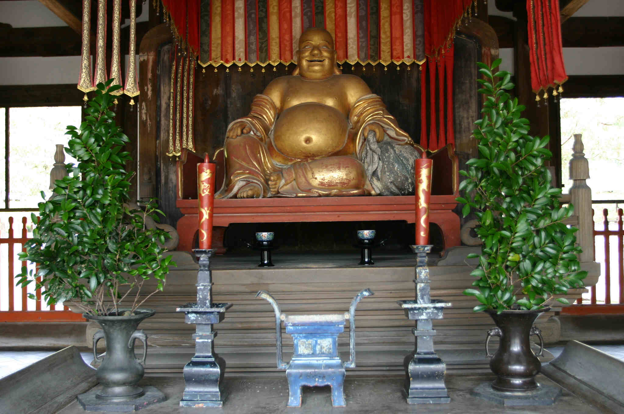 Manpuku temple buddha